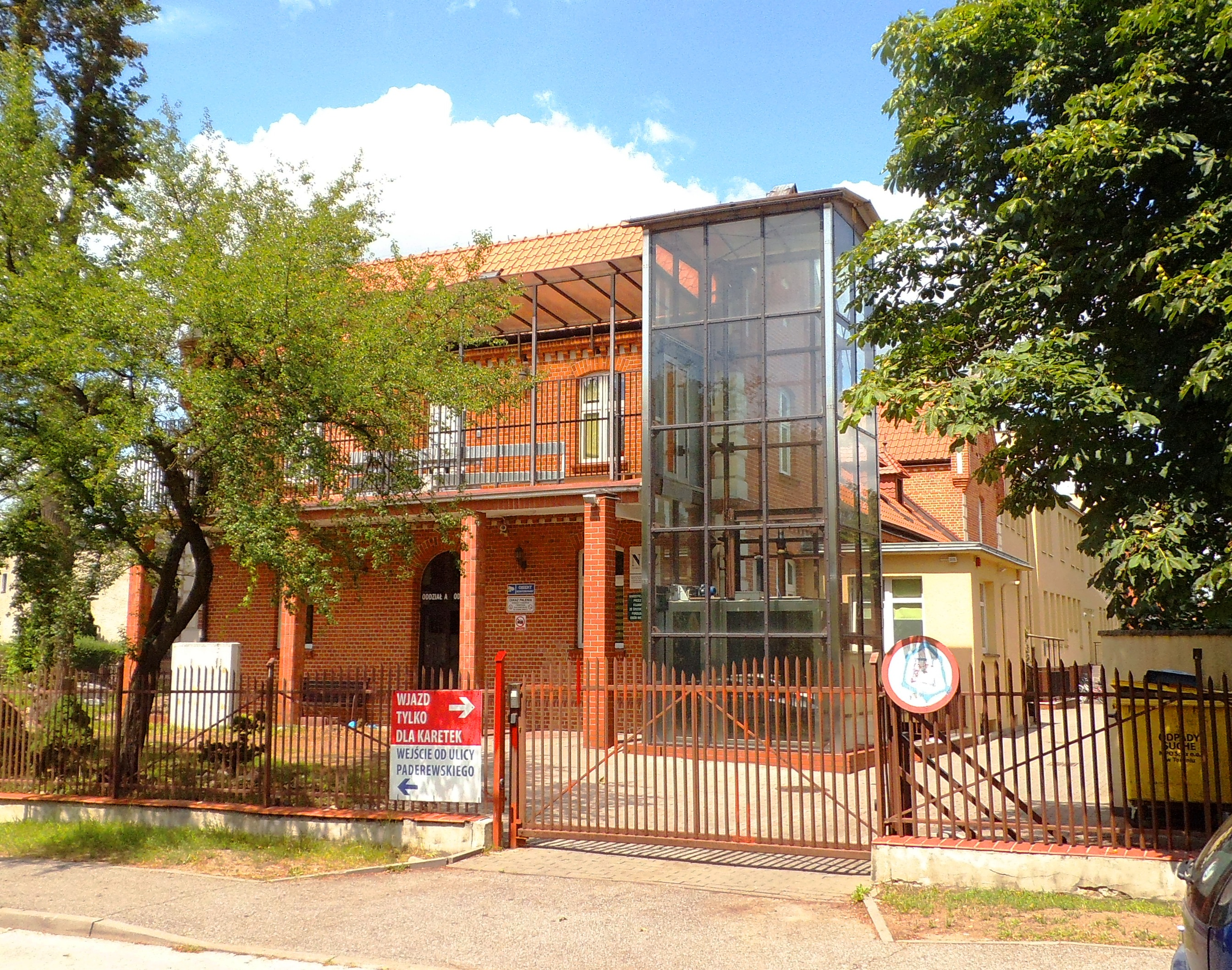 Zakład Opiekuńczo-Leczniczy w Toruniu